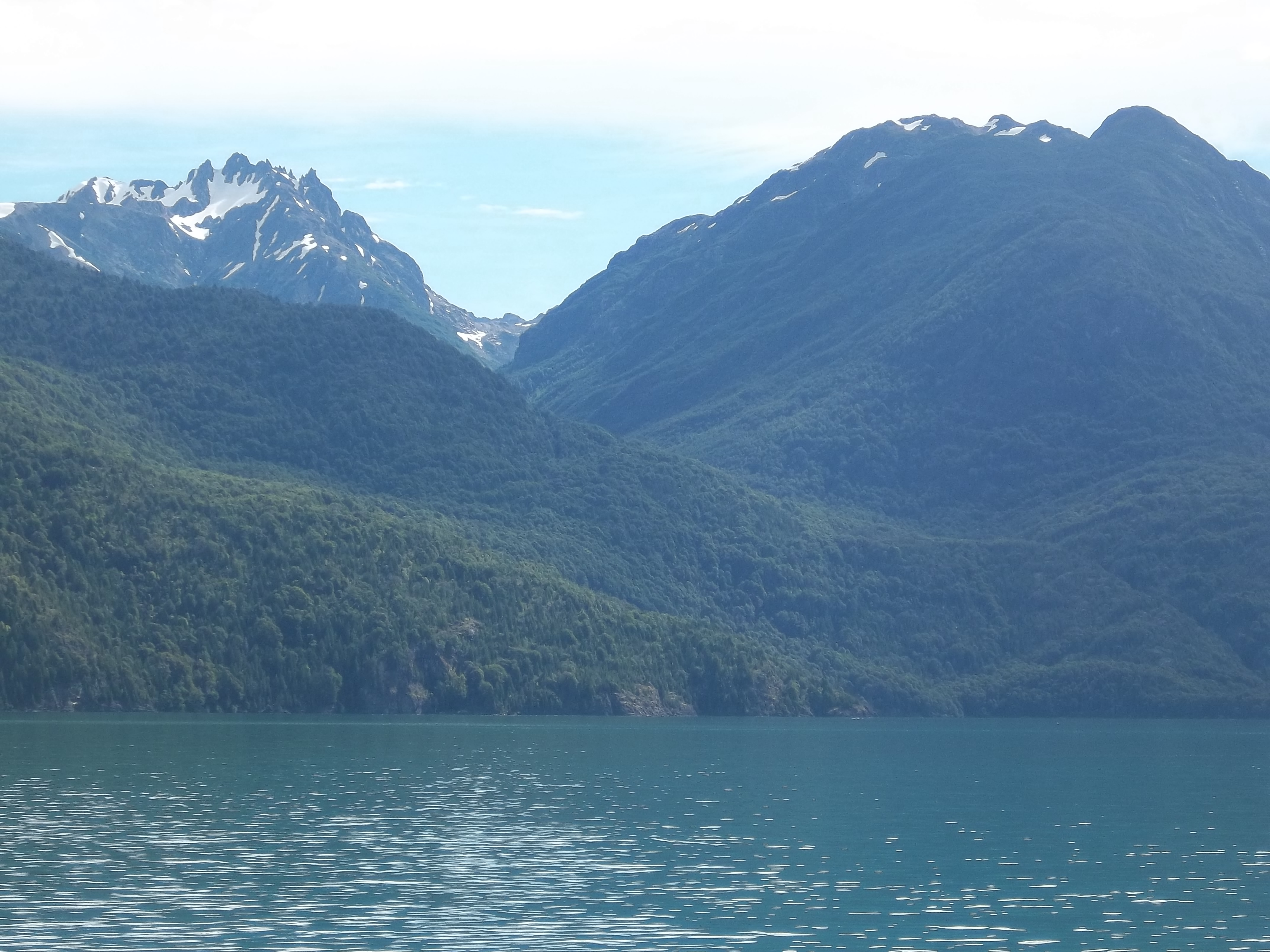 Cerro Aguja Sur (izquierda) desde el Lago Puelo en el noroeste de la provincia del Chubut, Argentina.